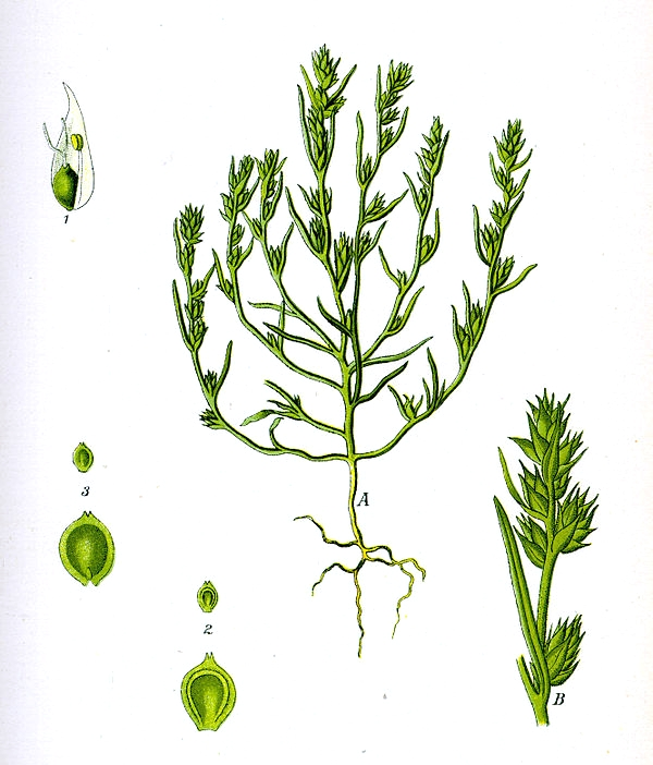 Name Corispermum intermedium Schweigg. ;Family:Chenopodiaceae Original book source: Prof. Dr. Otto Wilhelm Thomé Flora von Deutschland, Österreich und der Schweiz 1885, Gera, Germany Permission granted to use under GFDL by Kurt Stueber